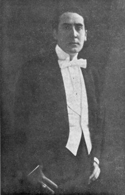 L'attore del cinema muto italiano Mario Bonnard (1889-1965). Fonte: Vittorio Martinelli, Il cinema muto italiano – I film degli anni venti / 1921-1922 , edizioni Bianco e Nero, Roma 1981, pag. 15.